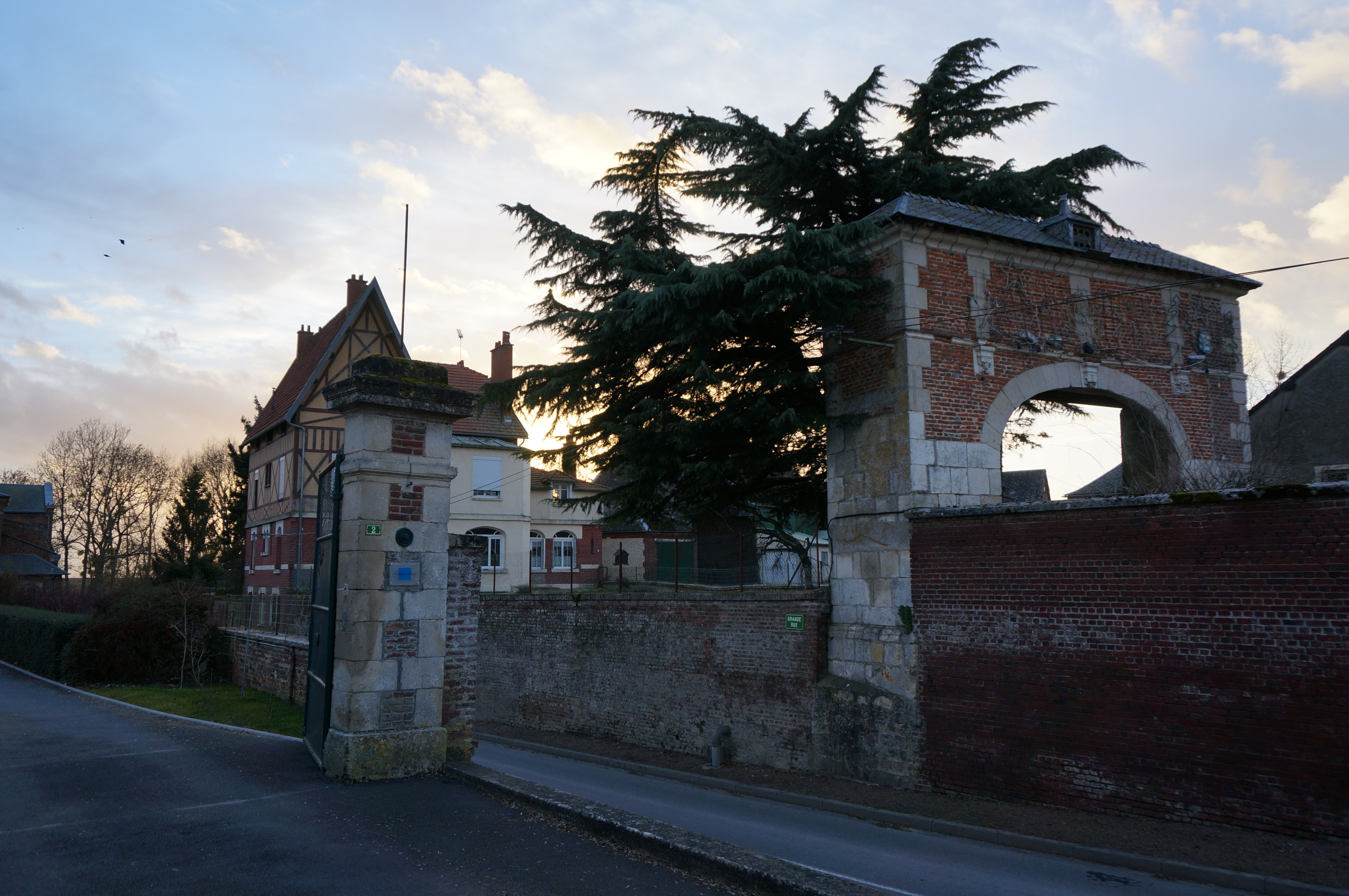 vue depuis La Neuville-Bosmont.